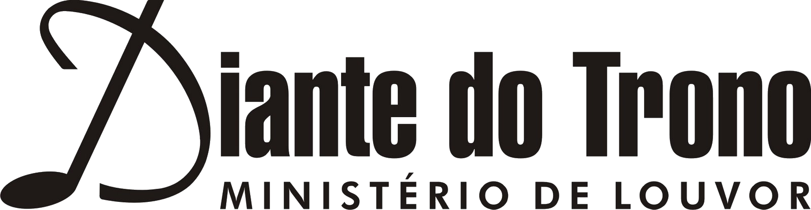 Logotipo do Diante do Trono.